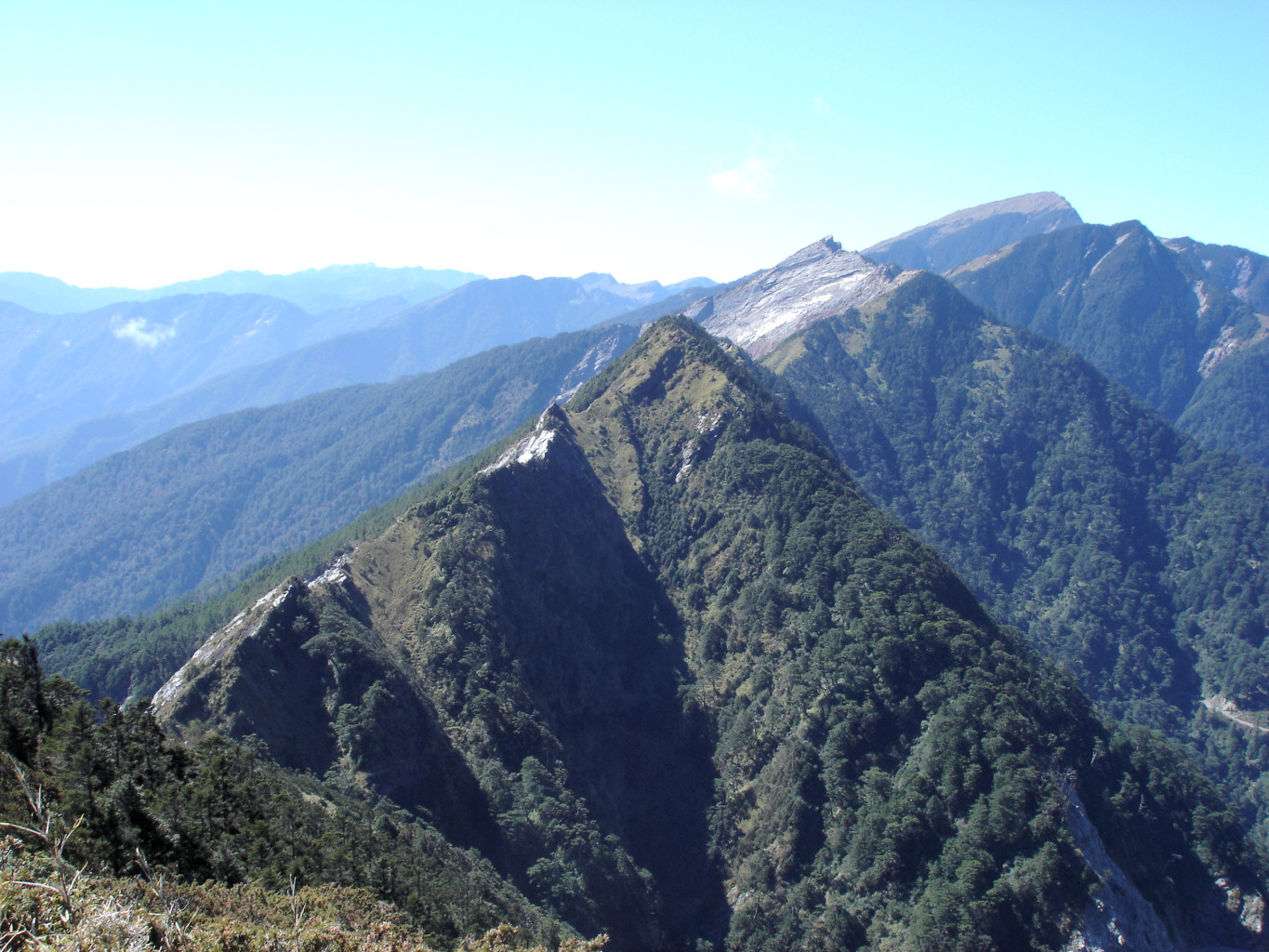 Taiwan, 高雄市桃源區梅山里